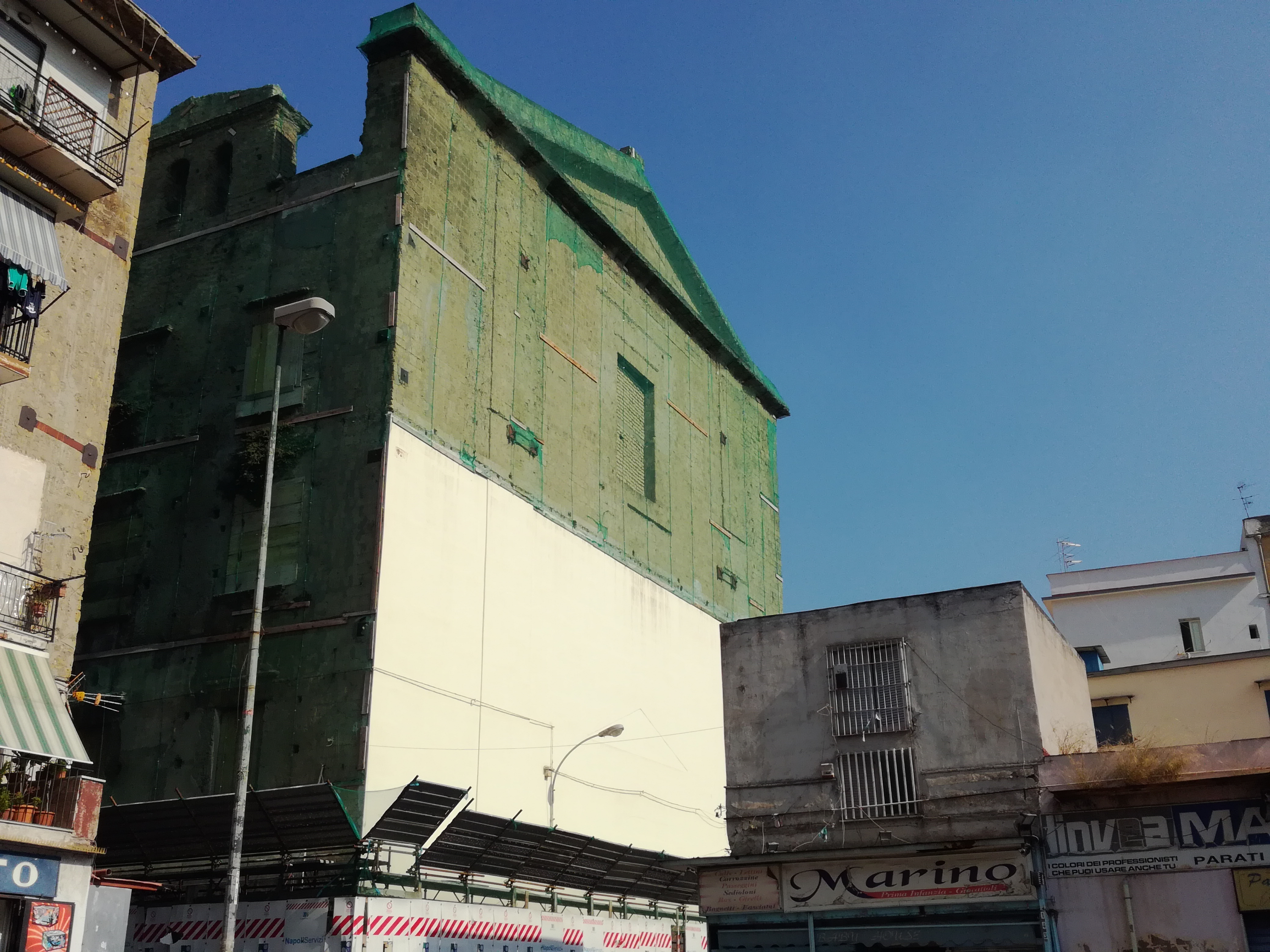 Chiesa del Carminiello al Mercato, Napoli